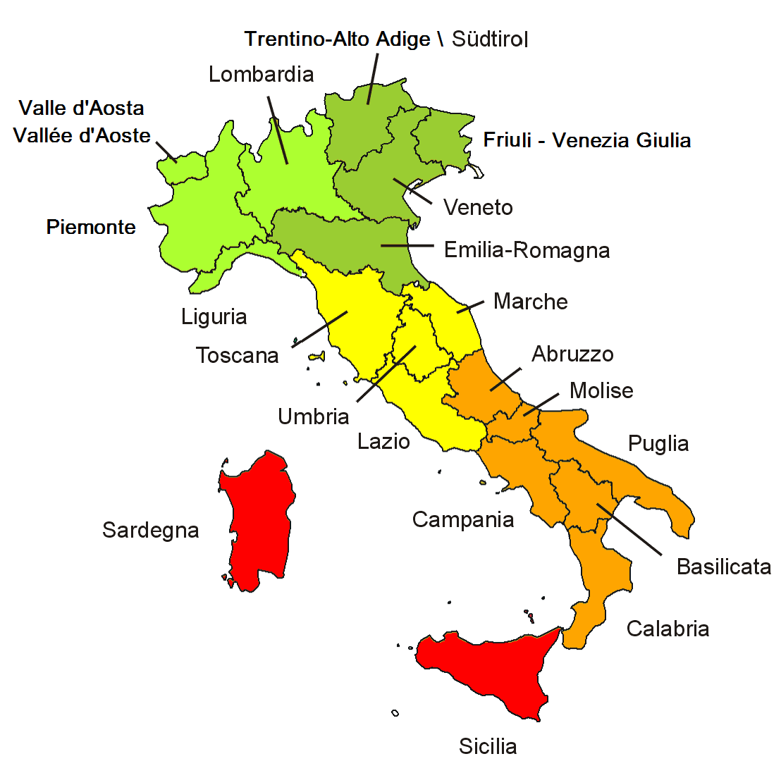 carte des différentes régions d'Italie